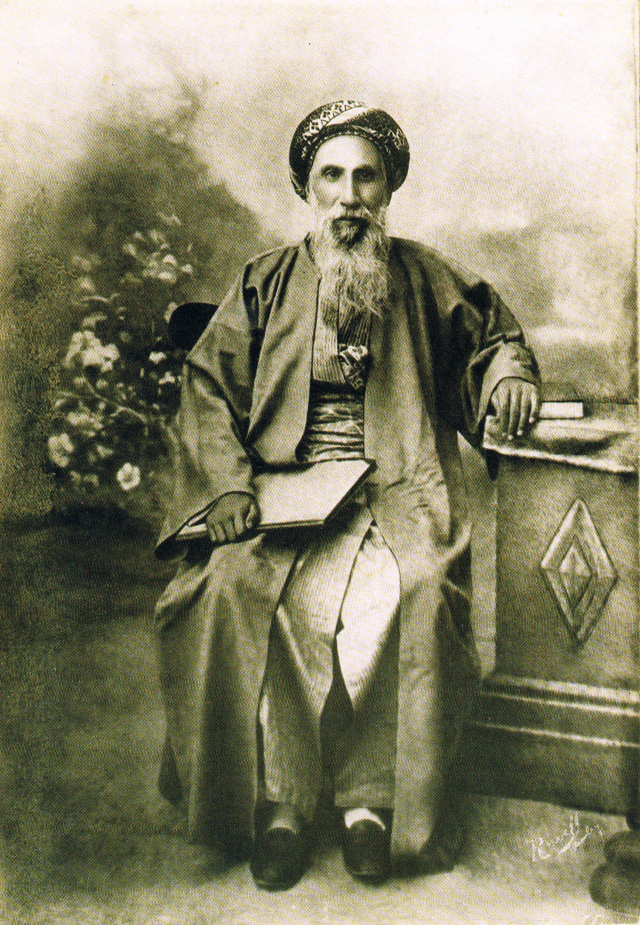 Avraham moshe hilel